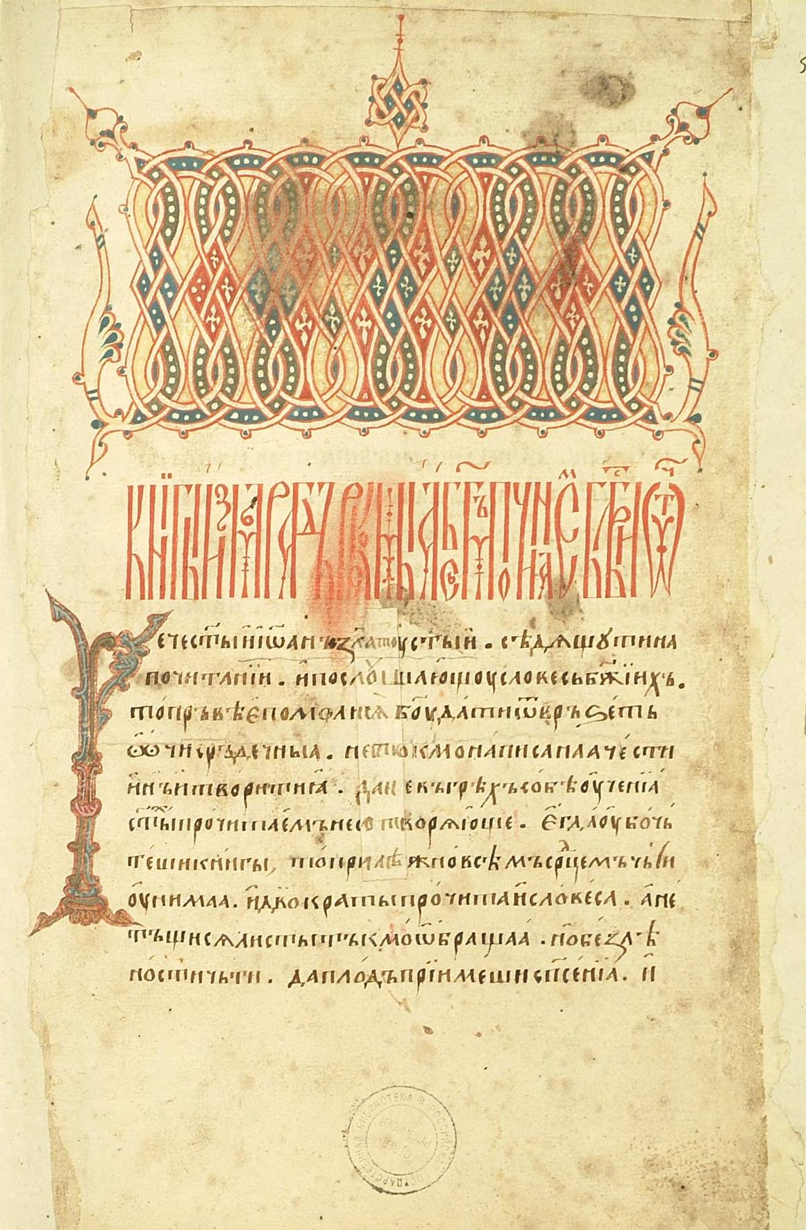 Рукопись № 203. (1574). Измарагд, полууст. нач. ХVІ века, в лист, 268 л. Фонд 304.I. Главное собрание библиотеки Троице-Сергиевой лавры. Полный текст списка.